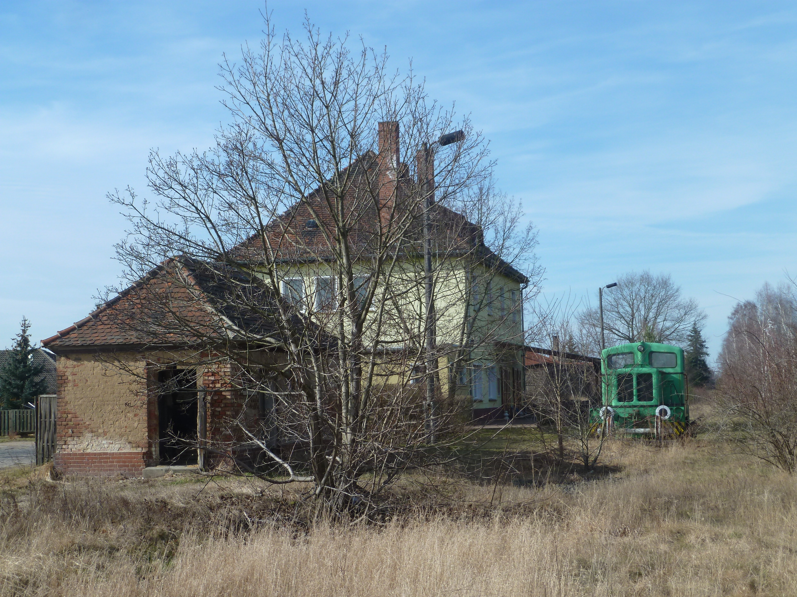 Bahnhof GörzkeUnknown former görzke train station